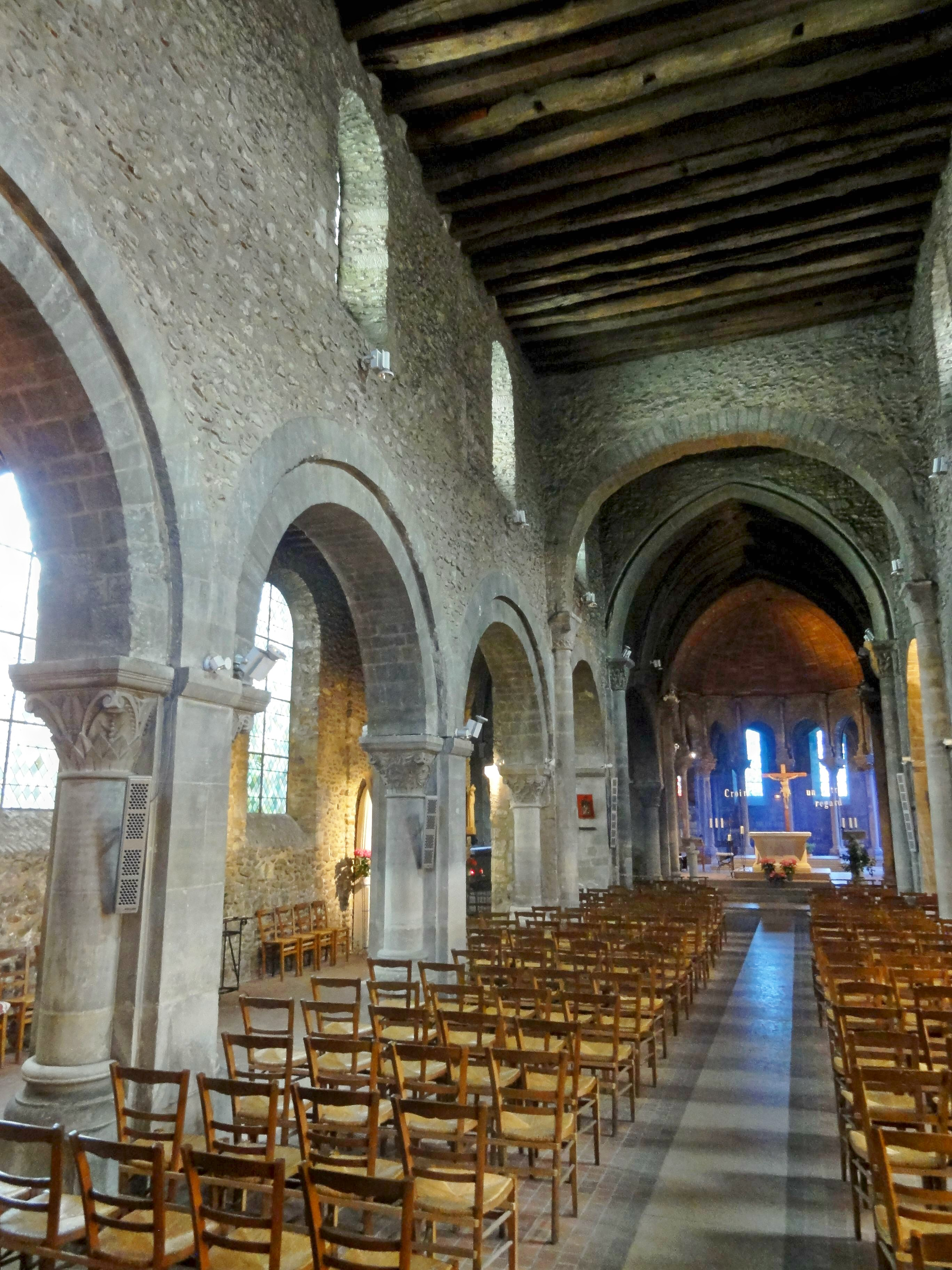 Vue générale intérieure.